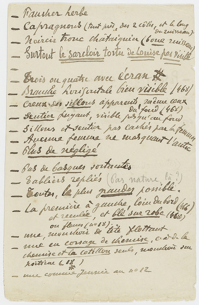 Reproduction numérique d'une note préparatoire manuscrite concernant Les Sarcleuses réalisée par Félix Arnaudin entre 1897 et 1898 sur papier.